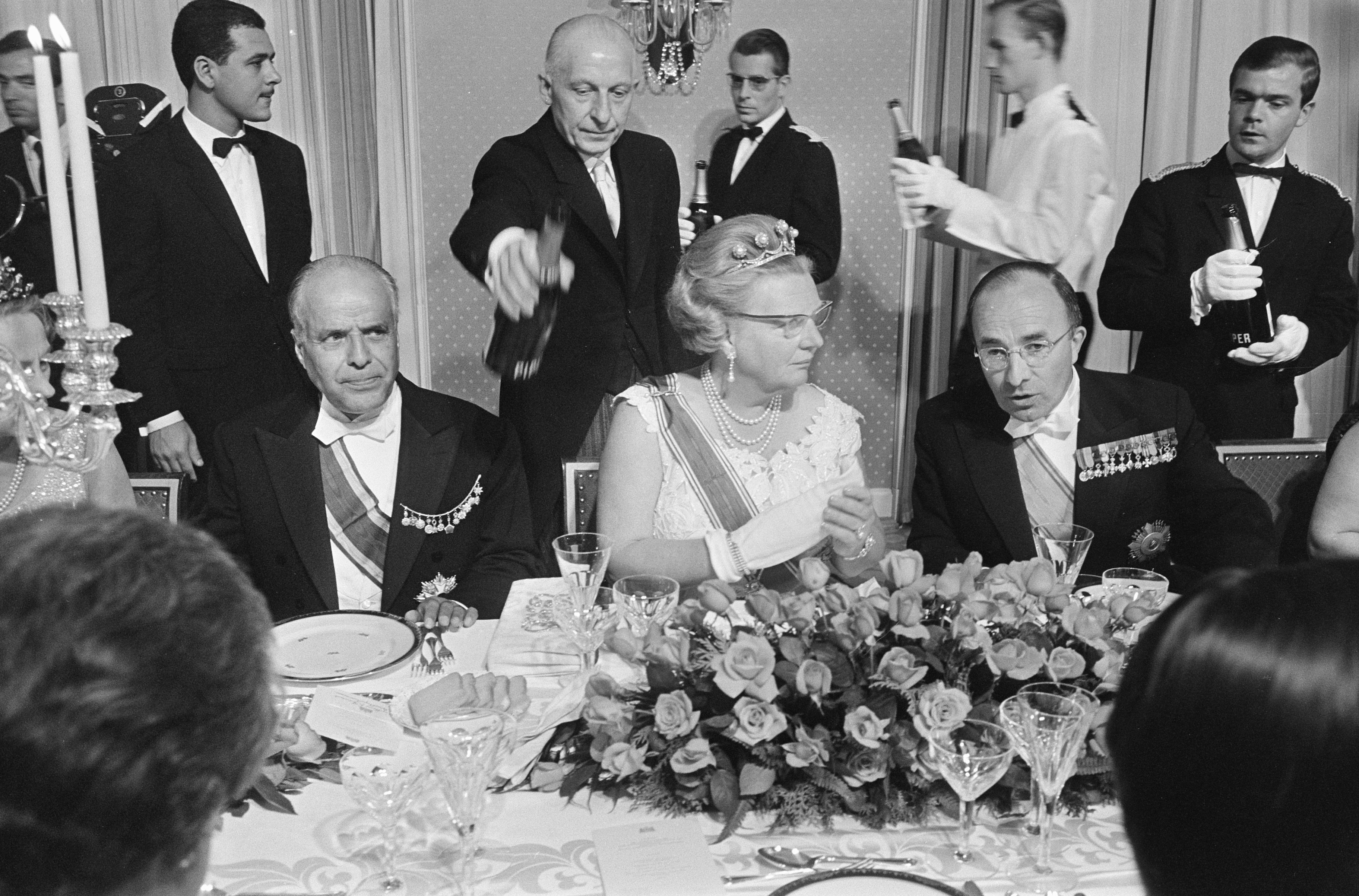 Collectie / Archief : Fotocollectie Anefo Reportage / Serie : [ onbekend ] Beschrijving : Regeringsdiner in Hotel de Wittebrug Datum : 7 juli 1966 Trefwoorden : diners, hotels, koninginnen Fotograaf : Koch, Eric / Anefo Auteursrechthebbende : Nationaal Archief Materiaalsoort : Negatief (zwart/wit) Nummer archiefinventaris : bekijk toegang 2.24.01.05 Bestanddeelnummer : 919-3313